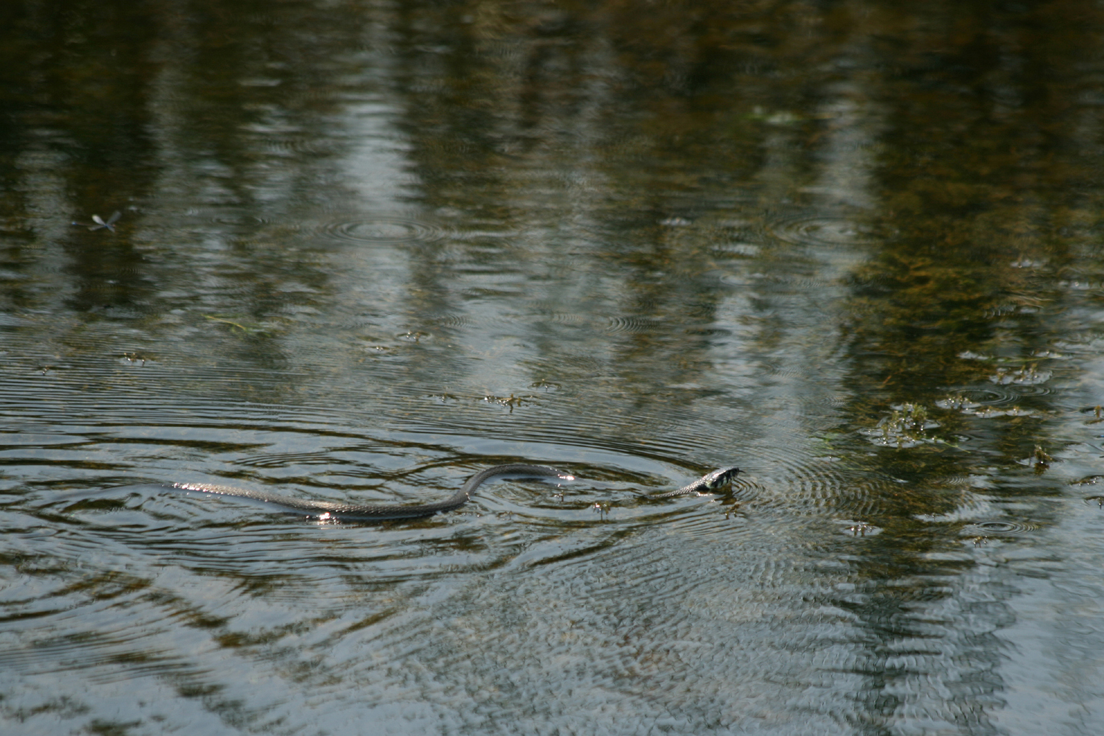 Serpent dans la rivière Zasavica